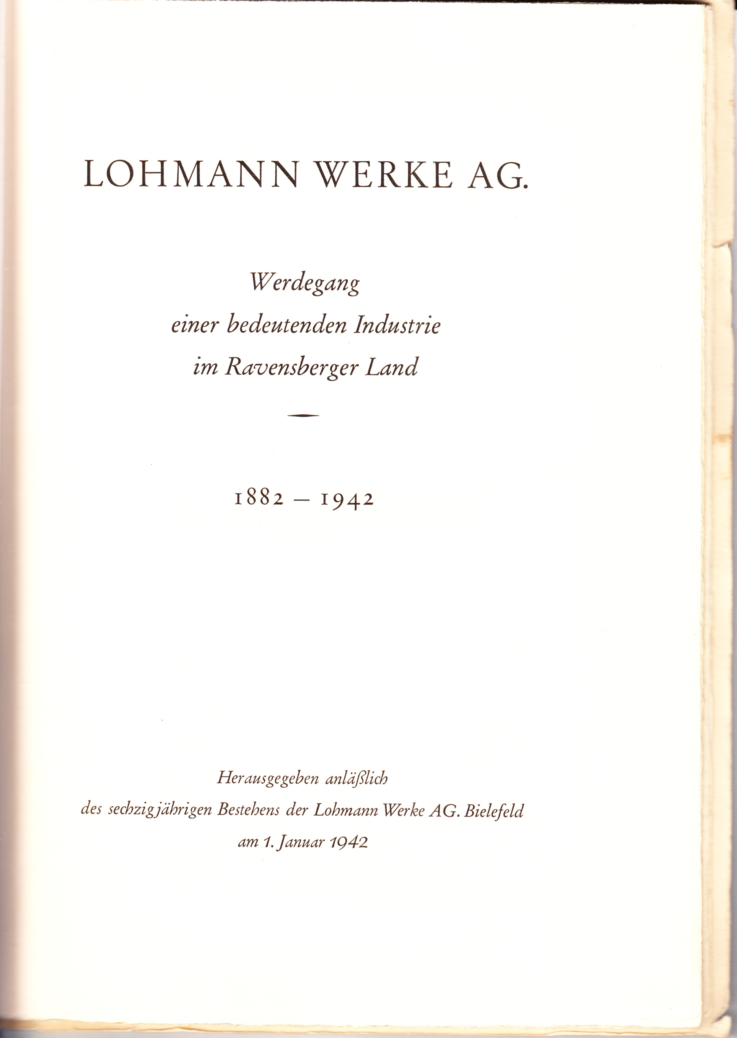 Festschrift